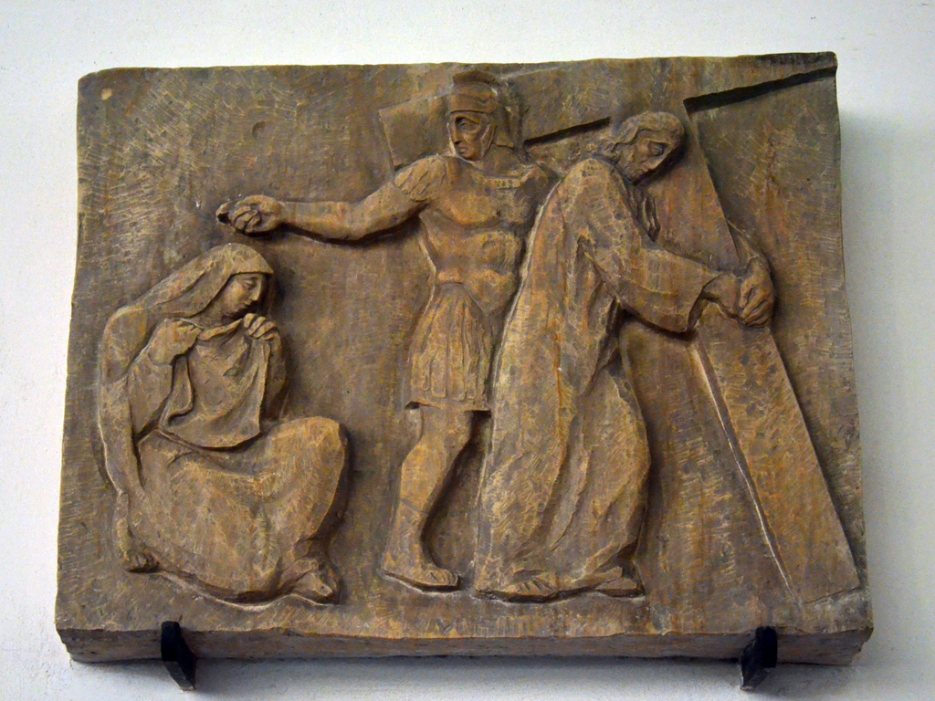 Bedřich Stefan: Křížová cesta (1930-33), Veroničina rouška, opuka, Kostel sv. Václava (Vršovice), Praha